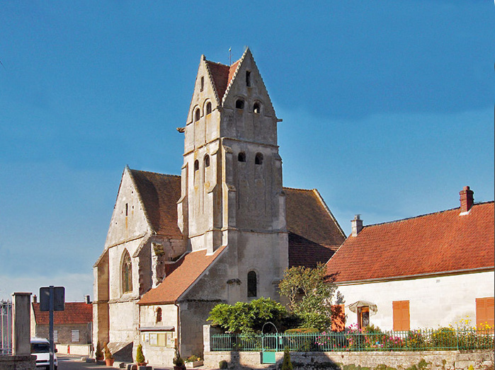 Vue de la rue principale d'Éméville